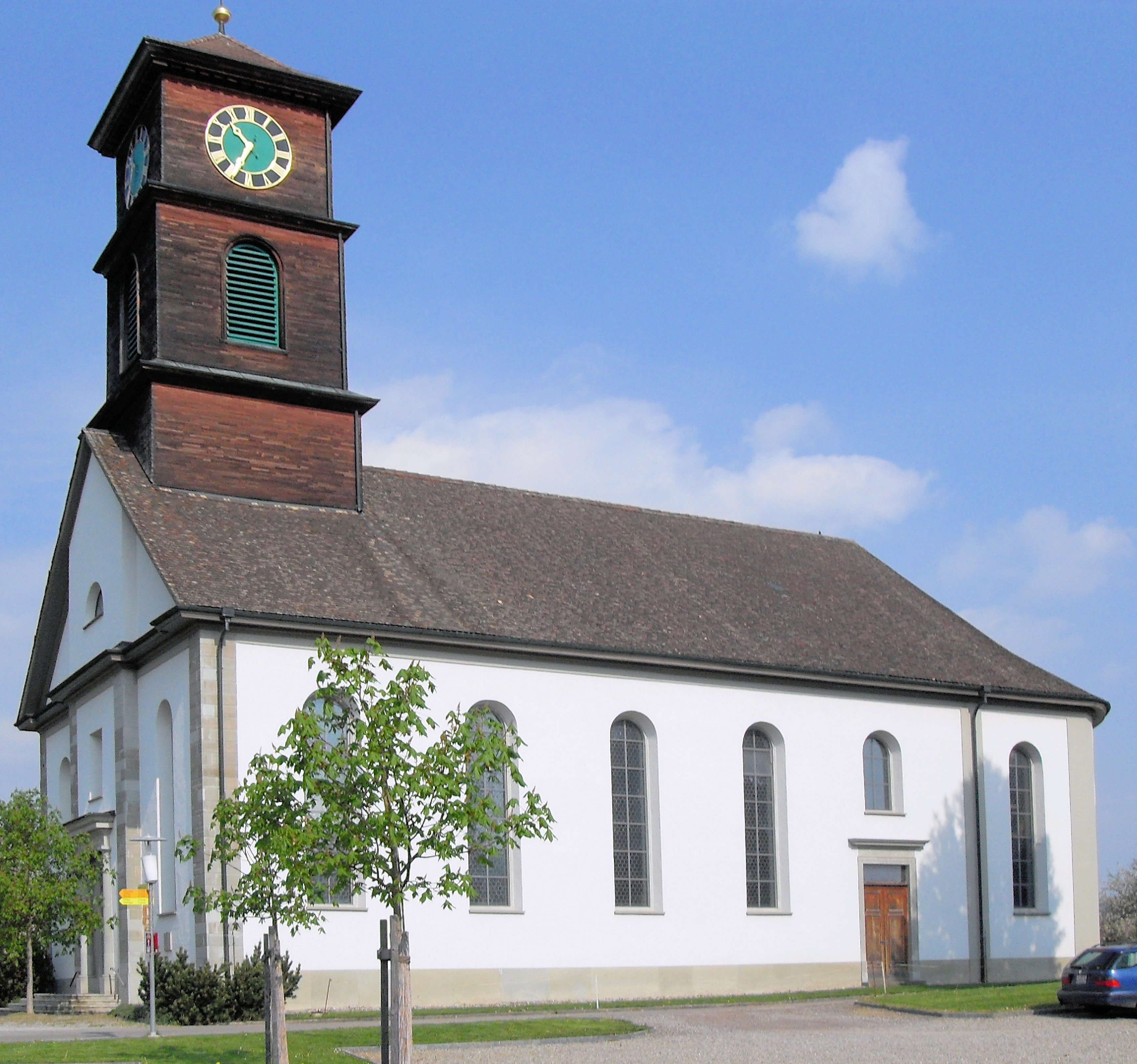 Paritätische Kirche St. Martin in Basadingen, Kanton Thurgau, Schweiz